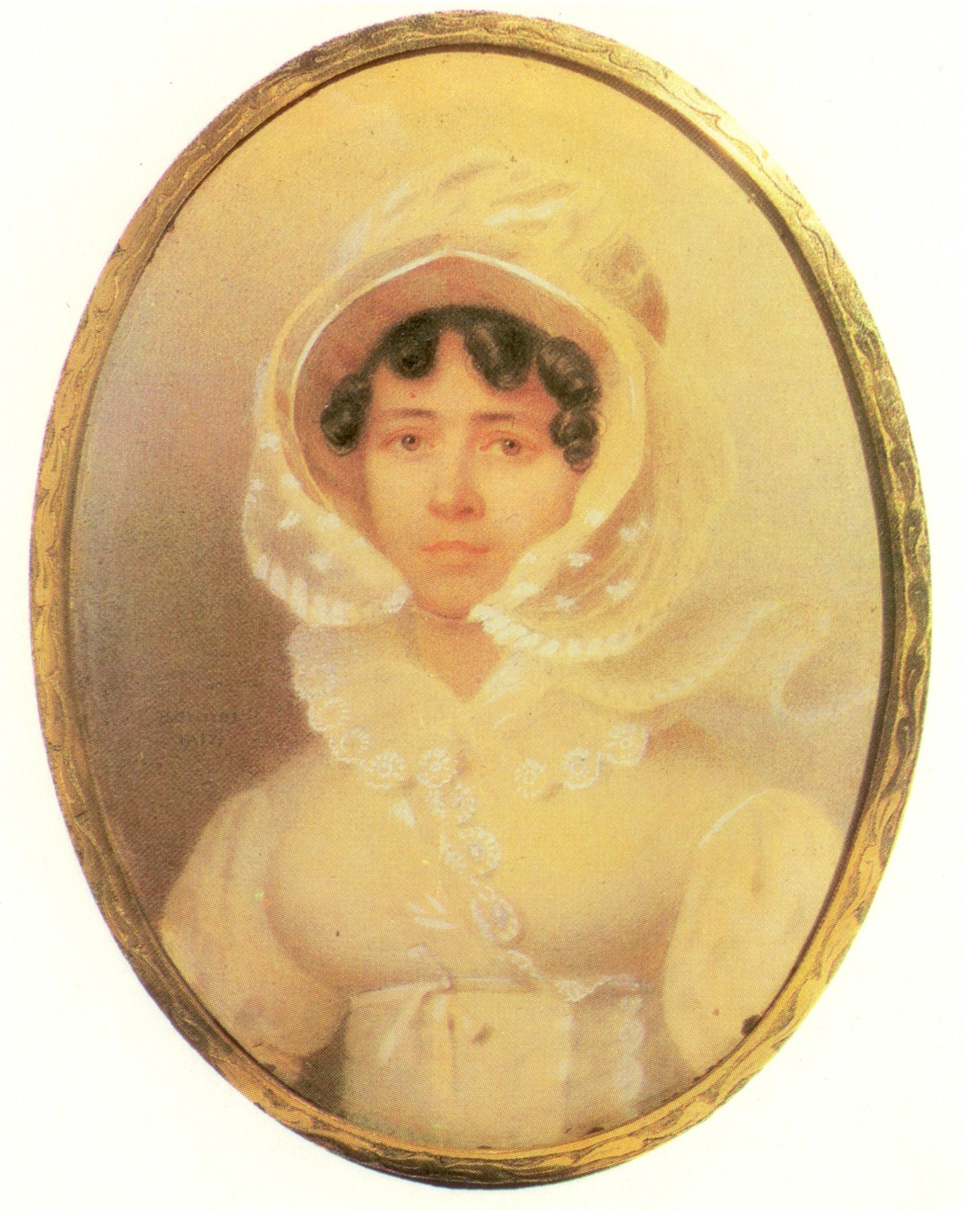 Portrait of Ekaterina Alexseevna Uvarova (1783-1849)